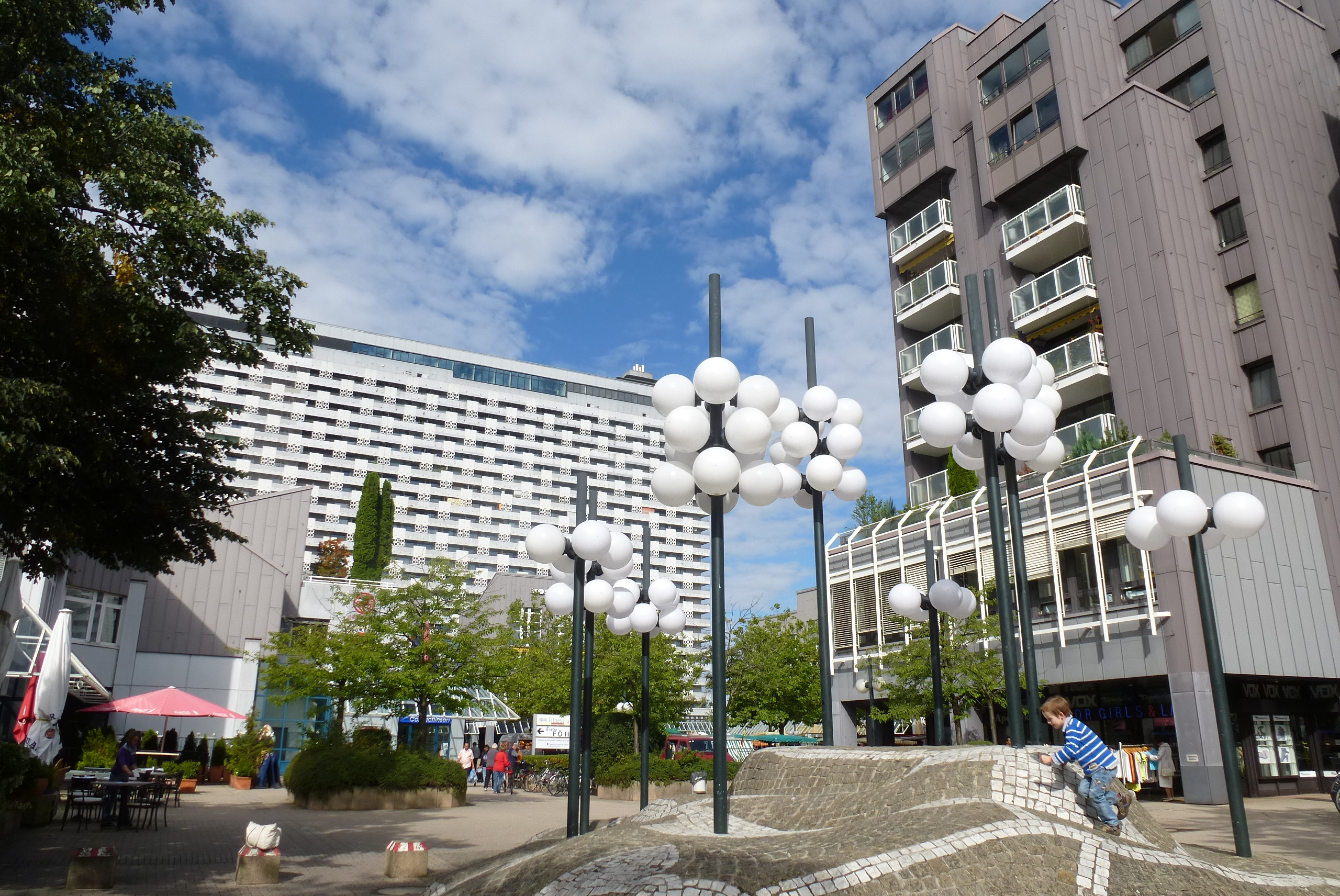 München, Rosenkavalierplatz im Arabellapark